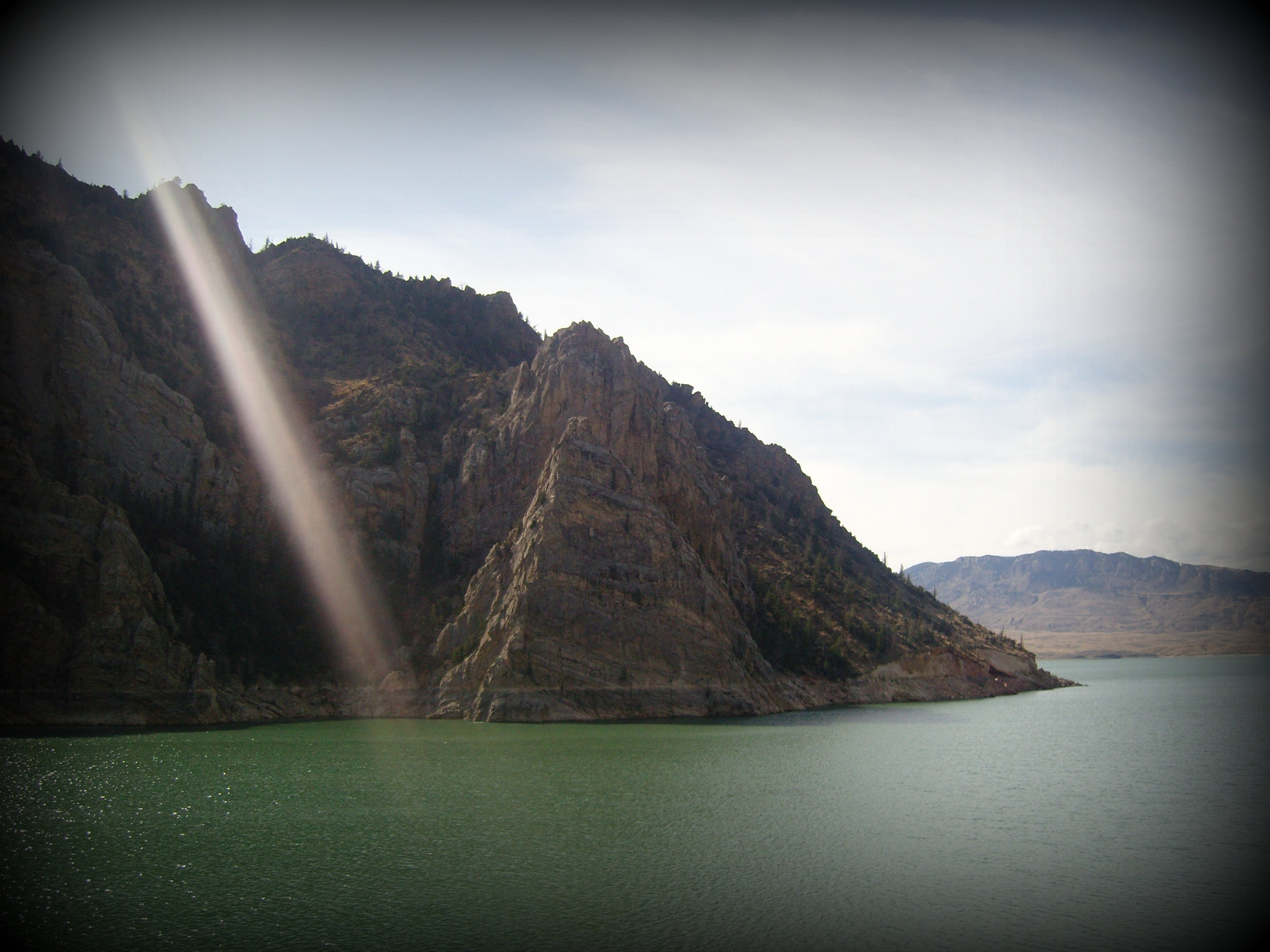 reservoir